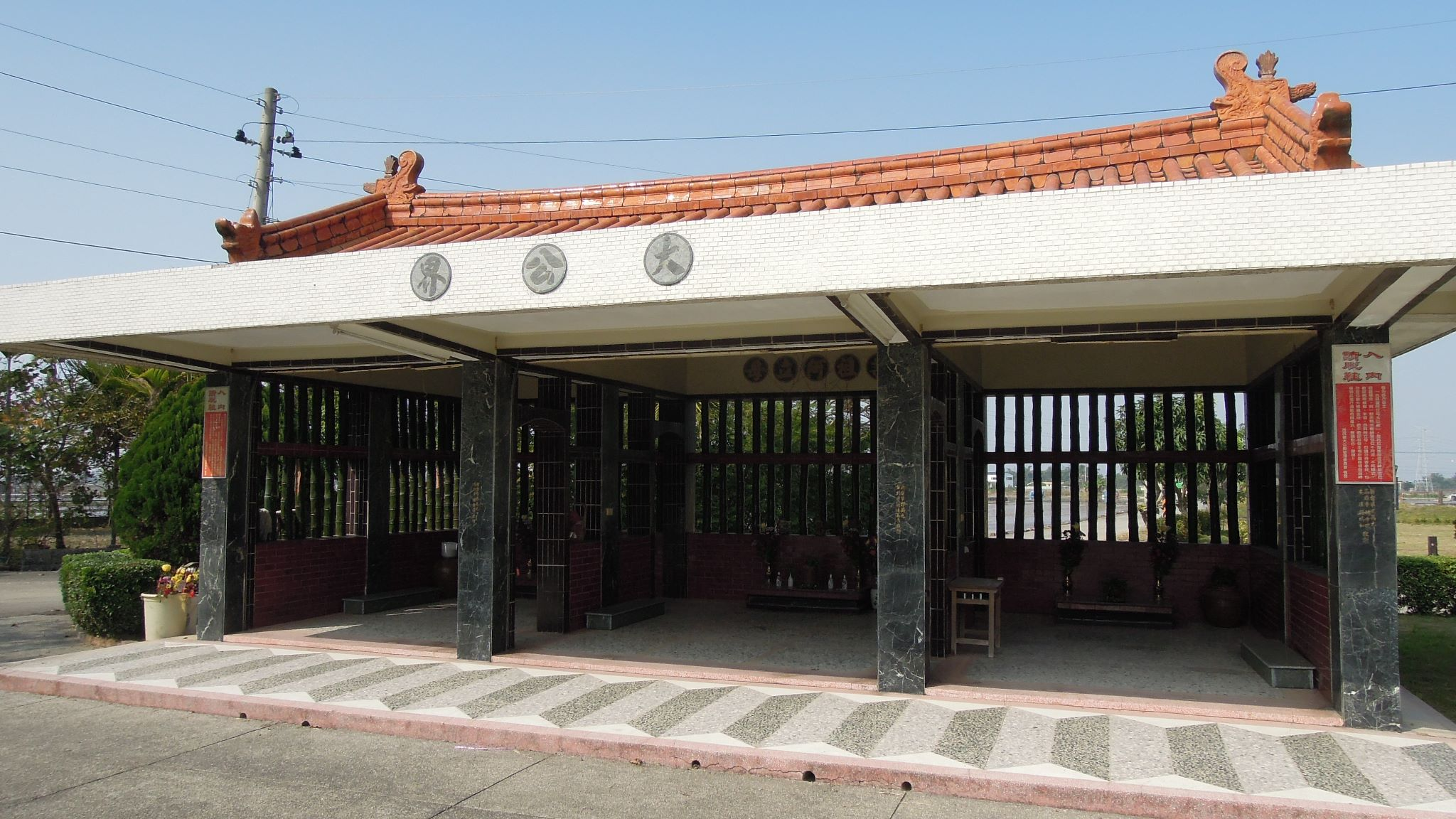 臺南市東山區吉貝耍大公界